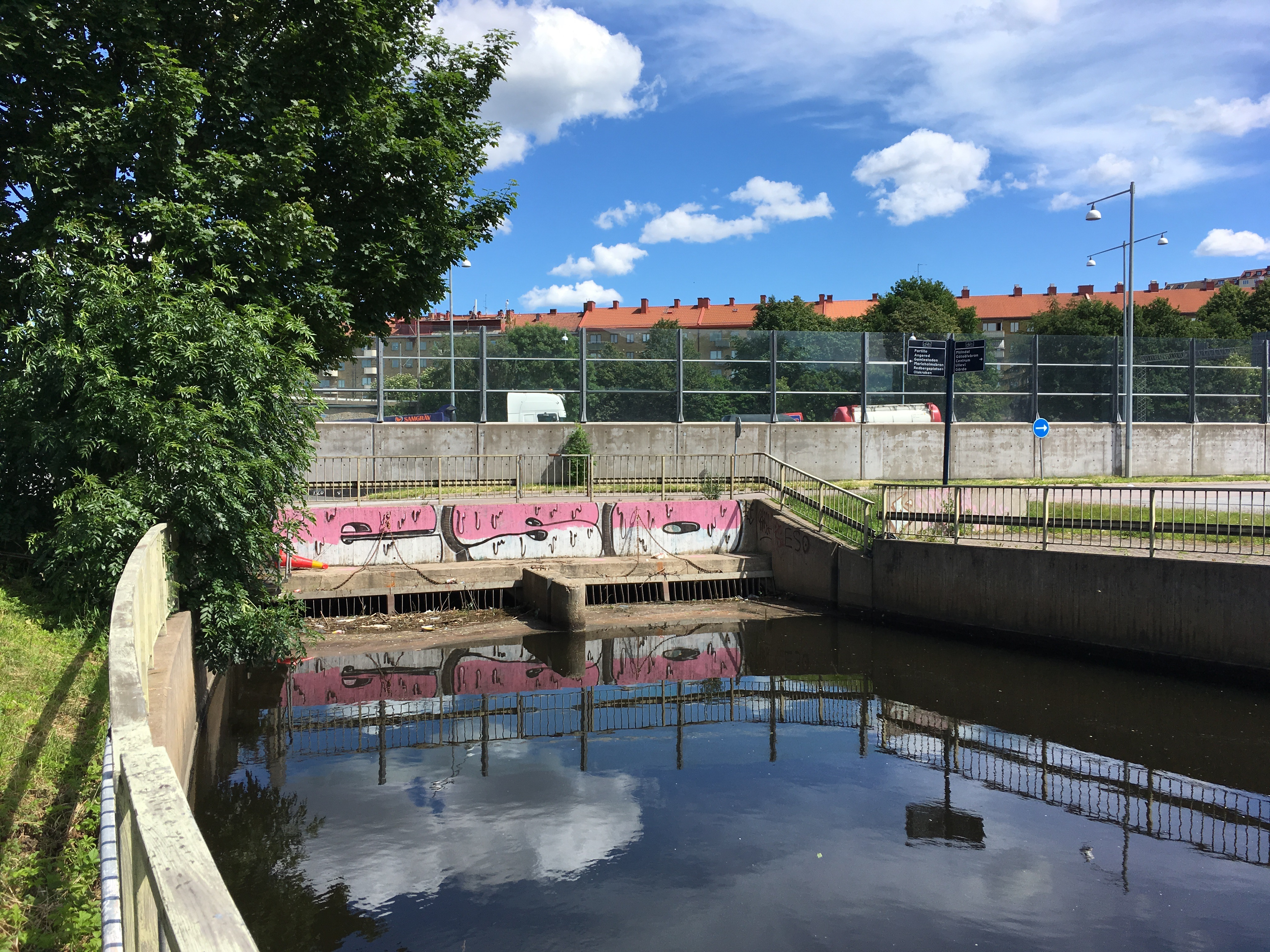 Kulvert för Gullbergsån – norra delen av Mölndalsån – vid Olskroken.